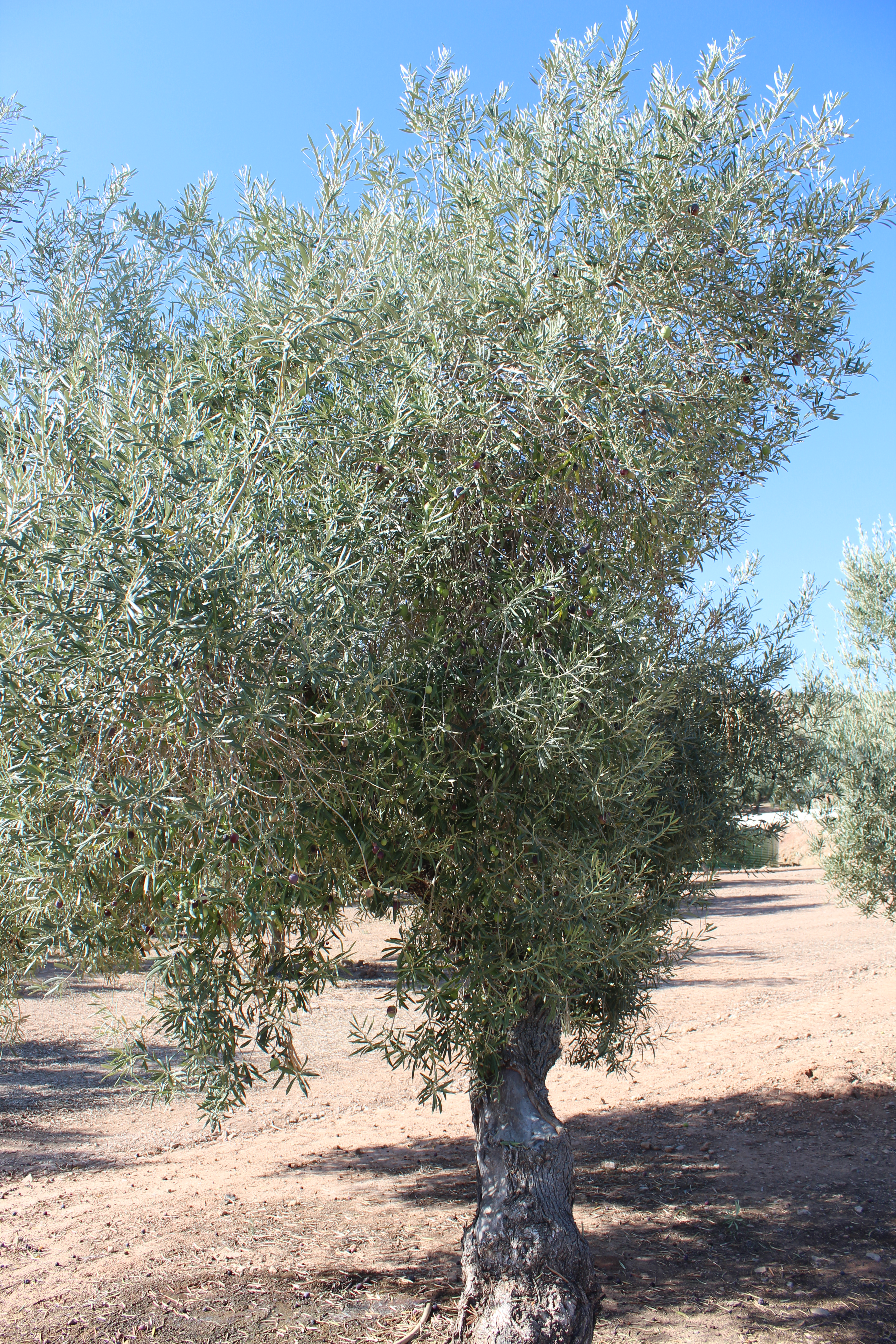 Olivo de Gordal Sevillana en la provincia de Jaén.